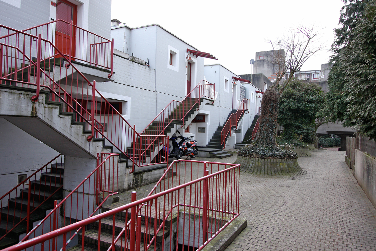 Köln-Chorweiler Wohnsiedlung Seeberg-Nord des Architekten Gottfried Böhm